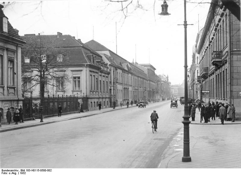 Zentralbild Berlin 1932 Blick vom Wilhelmplatz in die Wilhelmstraße, Richtung Unter den Linden; links die Seitenflügel und Einfahrt zum Ehrenhof des Reichskanzlerpalais.